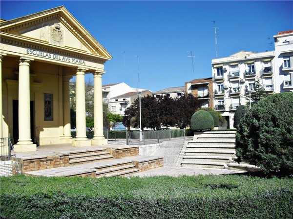 Detalle del escenario y fachada del Anfiteatro Ave María en Don Benito.